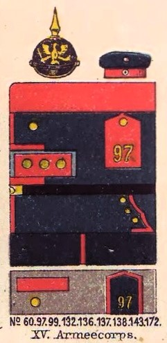 Schematische Farbdarstellung der Uniformen der Elsässischen und im Elsass stationierten Infanterie-Regimenter Nr. 60, 97, 99, 132, 136, 137, 138, 143, 172.